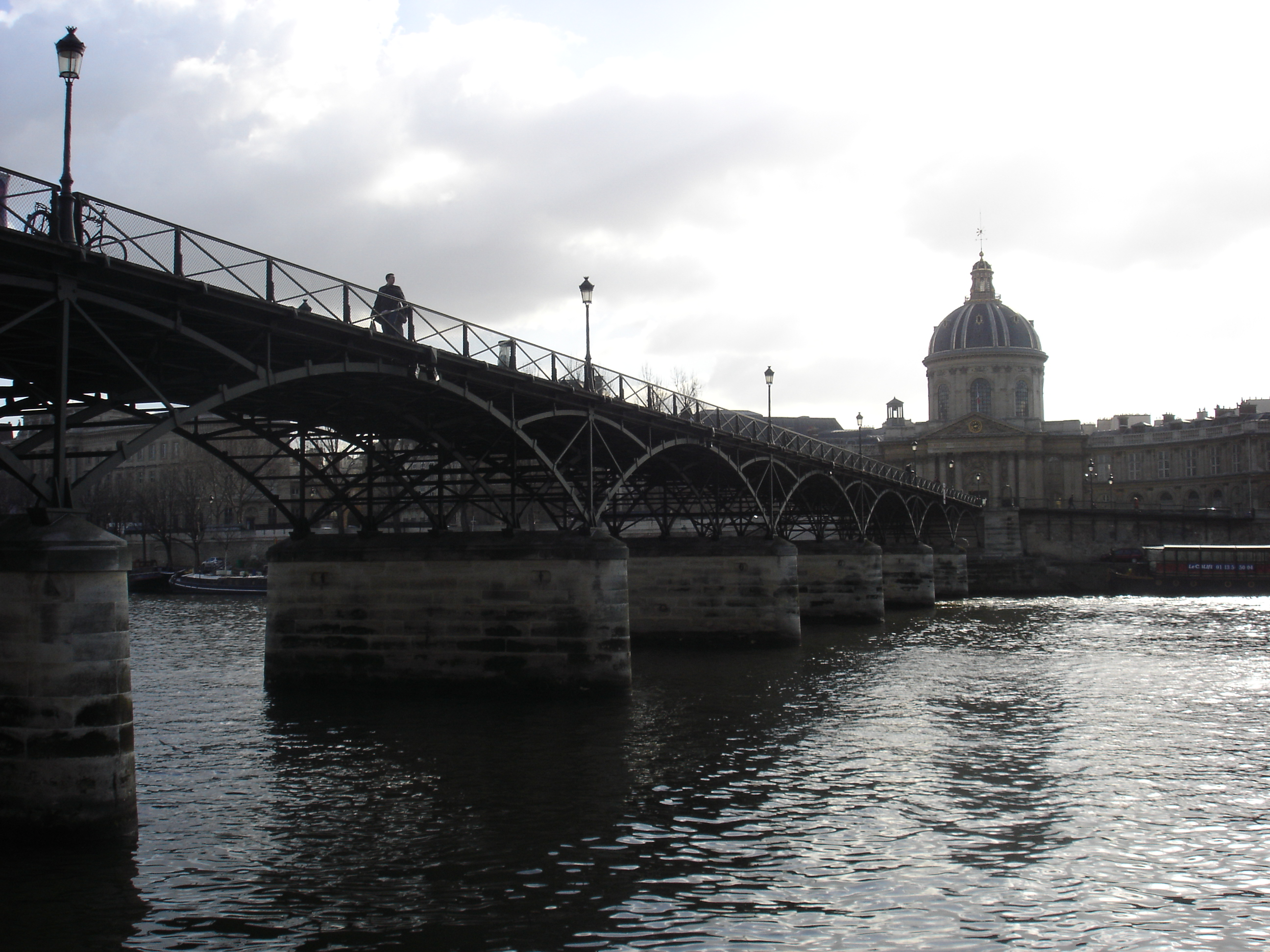 Le Pont des Arts vu depuis les quais de la rive droite, avec l'Institut de France au fond.